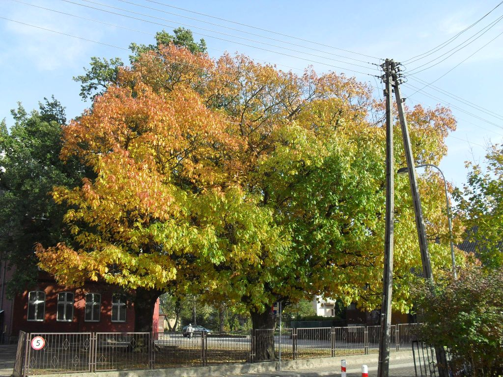 Pomnik przyrody dąb czerwony na terenie gimnazjum nr 22 przy ul. gen. H. Dąbrowskiego 8